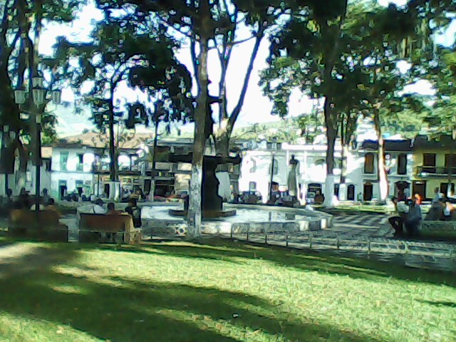 Es un parque bonito, con la iglesia la inmaculada, la alcaldía, y otros monumentos